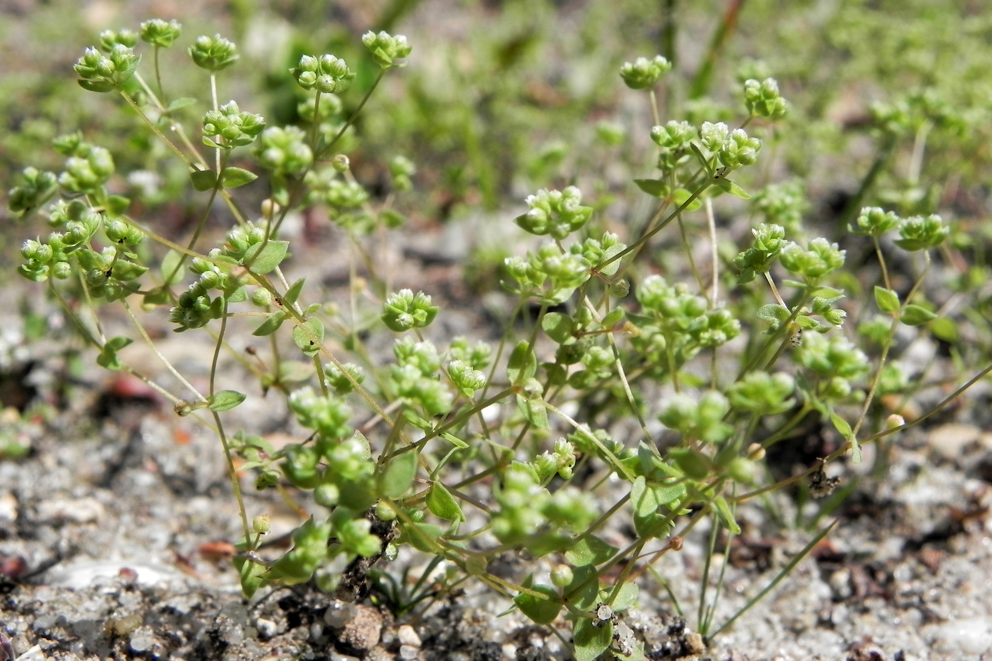 Zwerglein(Radiola linoides, Oldendorf, Landkreis Celle, Germany)